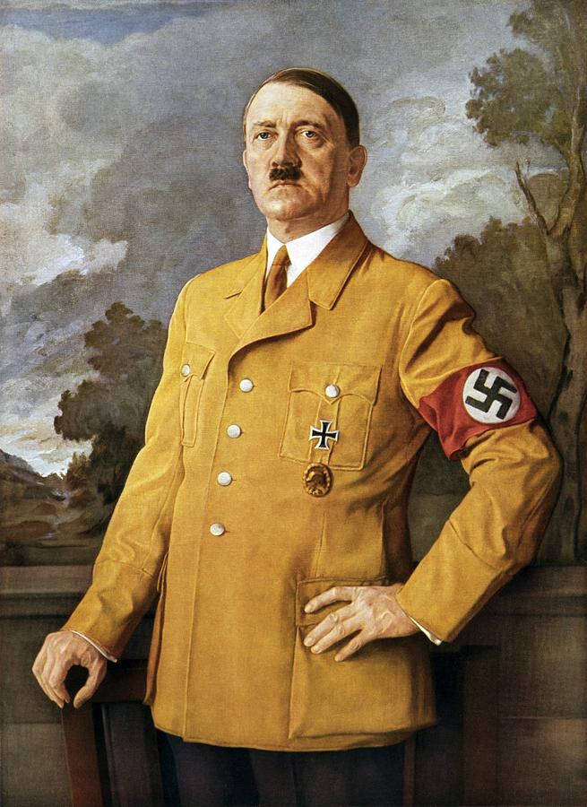 „Führerbildnis“ (1937)